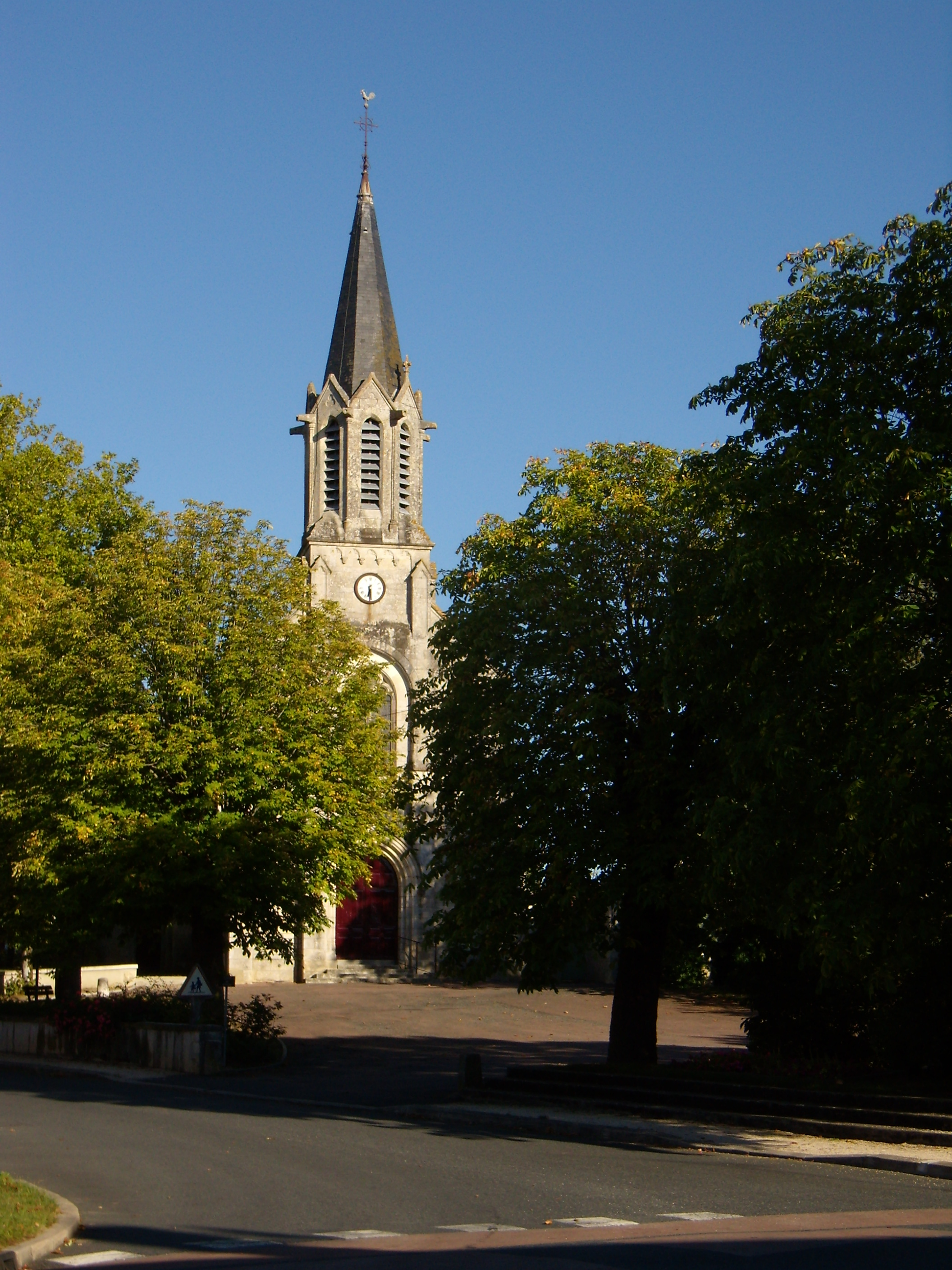 Velles (Indre) - Eglise Saint Etienne